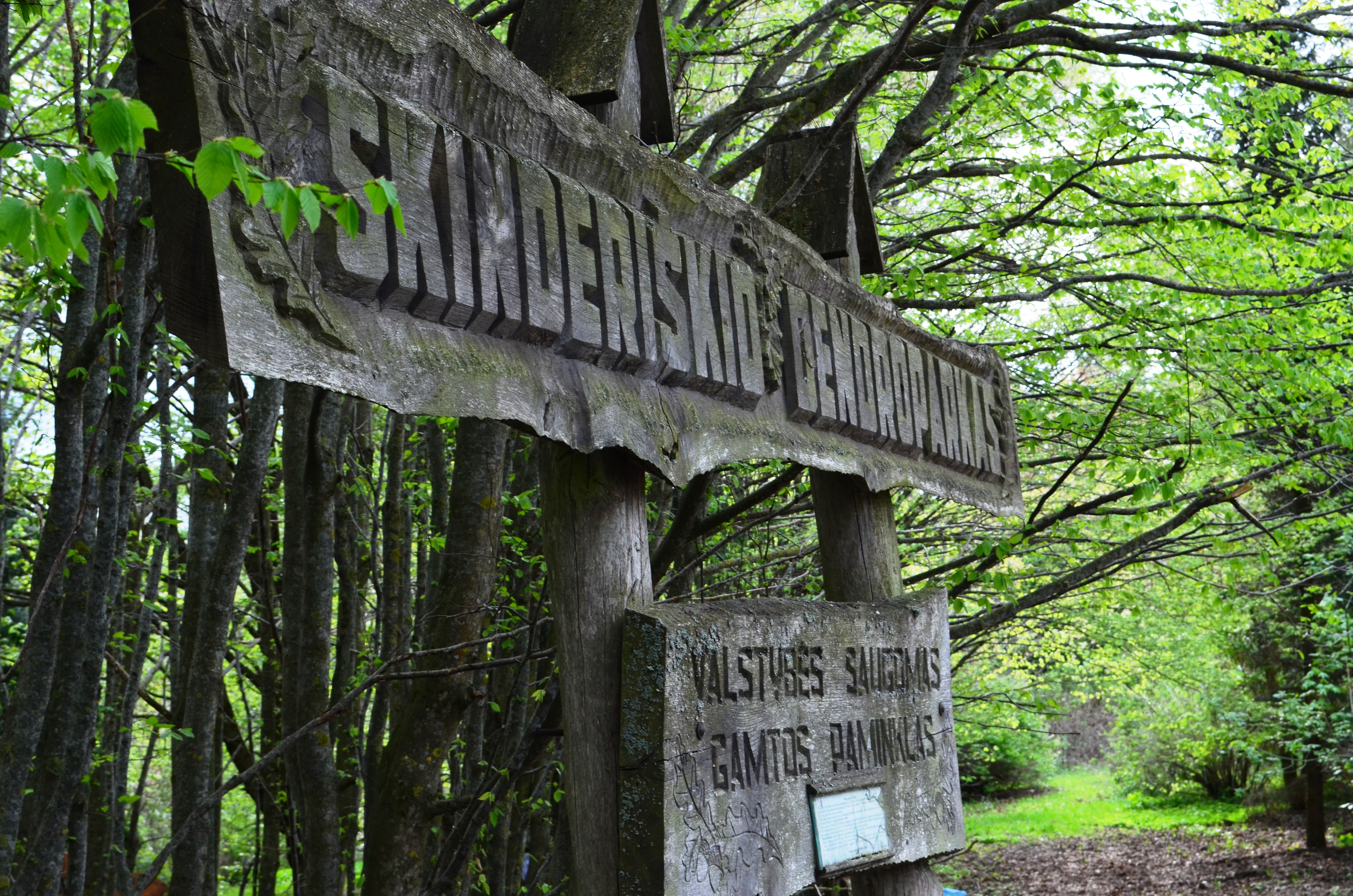 Skinderiško dendroparkas. Kėdanių r.